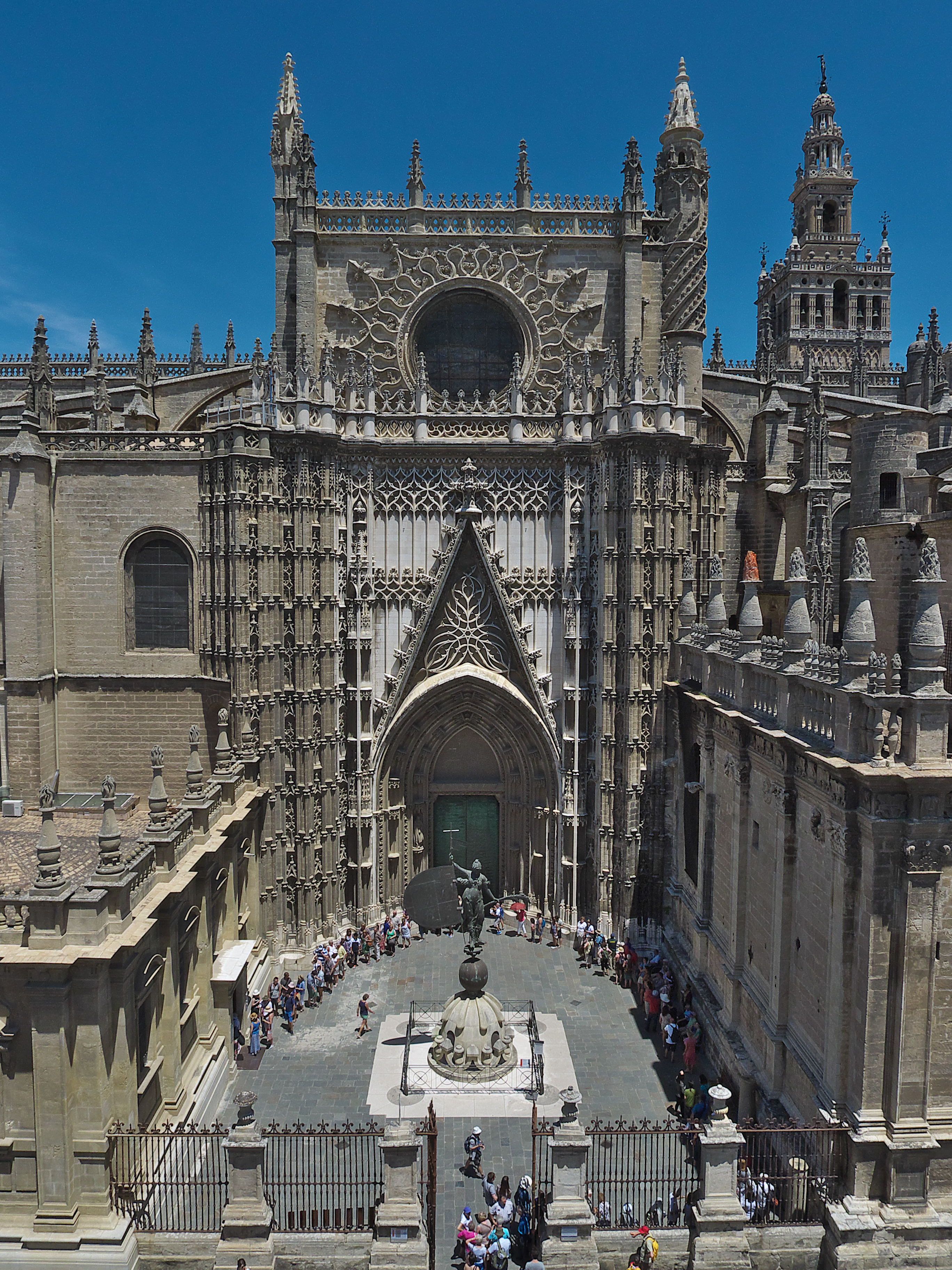 Hastial sur del transepto. También conocida como Puerta de San Cristóbal, del Príncipe, de la Lonja y otras identificaciones. La terminación de la misma es de Adolfo Fernández Casanova (1885)